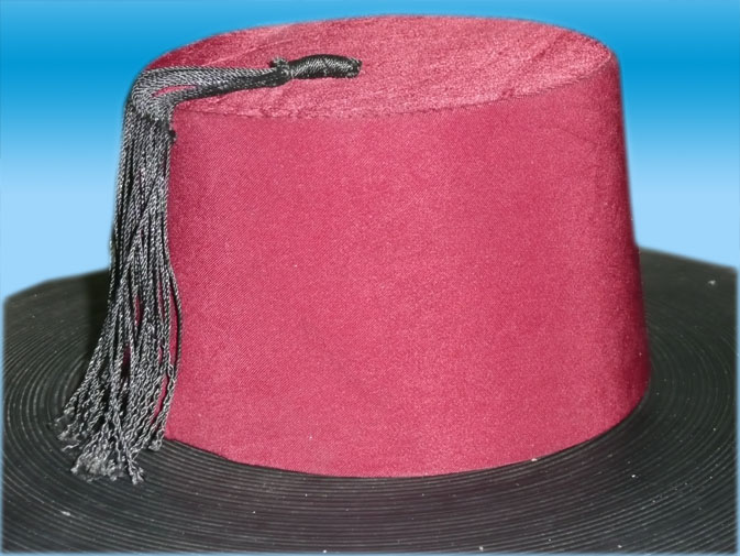 Cette photo a été prise par Mr Abou Cheik et m'a été gracieusement offert pour l'inserer dans mon article sur le kofia